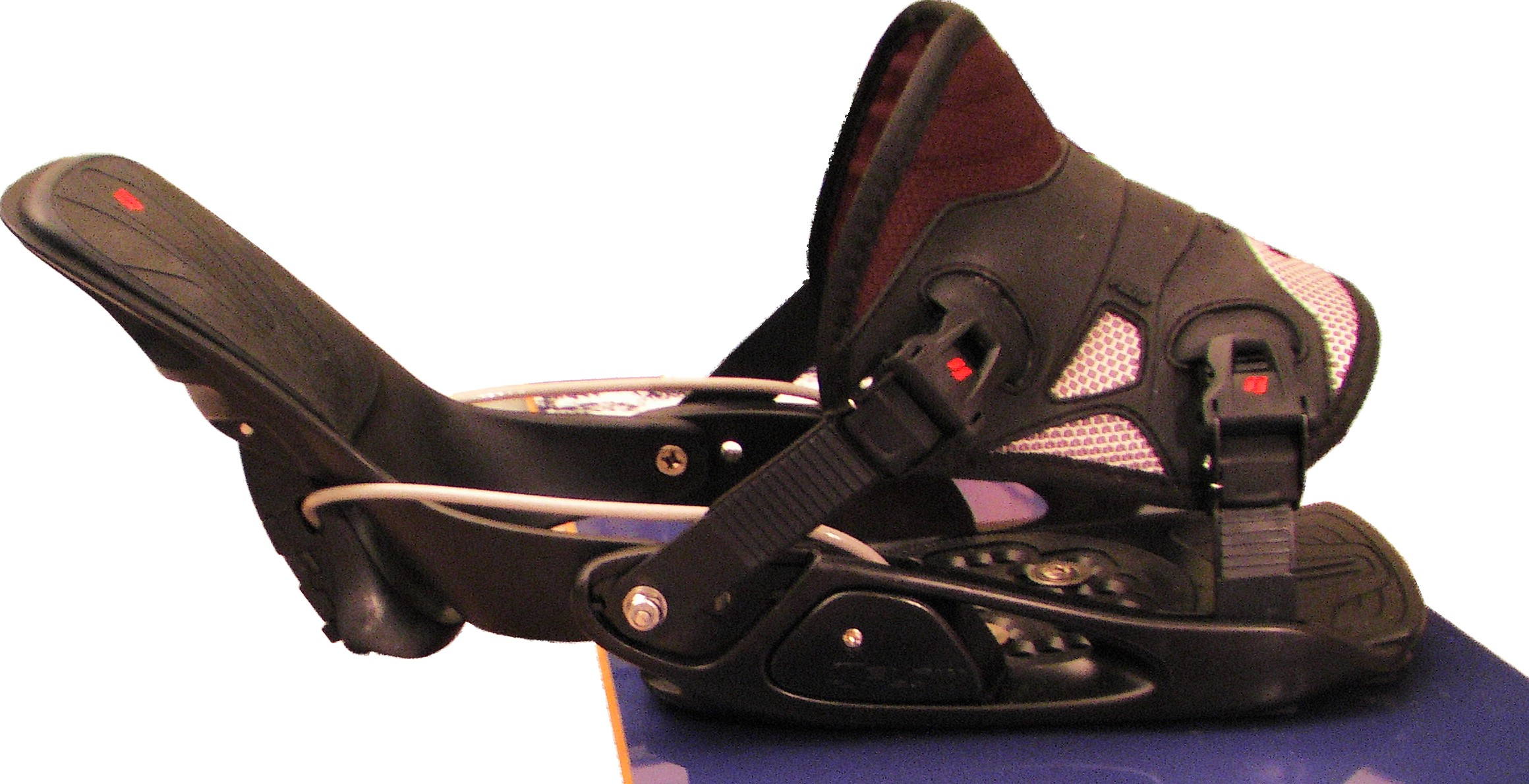 Snowboard-Bindung der Marke Flow mir abgeklapptem Highback